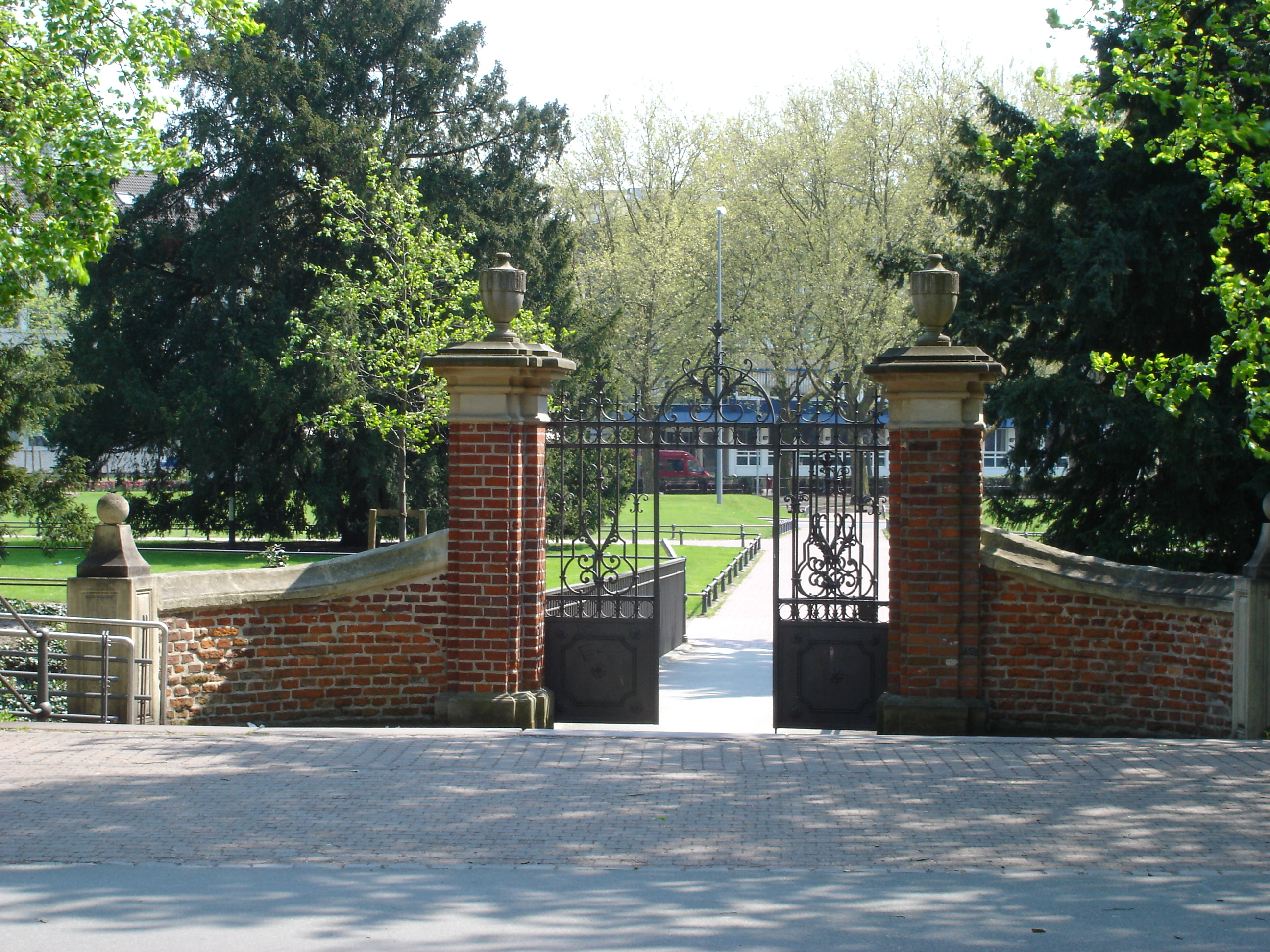 Eingangstor zur Engelenschanze an der Promenade in Münster, Westfalen, Deutschland